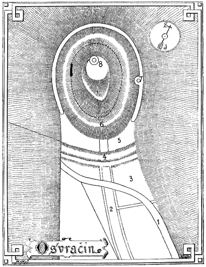 Osvračín – půdorys hradu z roku 1893 (1 – nová cesta, 2 – stará cesta, 3 – čtverhranné opevnění, 4 – příkop, 5 – parkán, 6 – příkop, 7 – studna, 8 – hrad se zbytky věže)